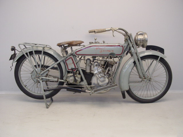 Harley-Davidson Model 16C út 1916.